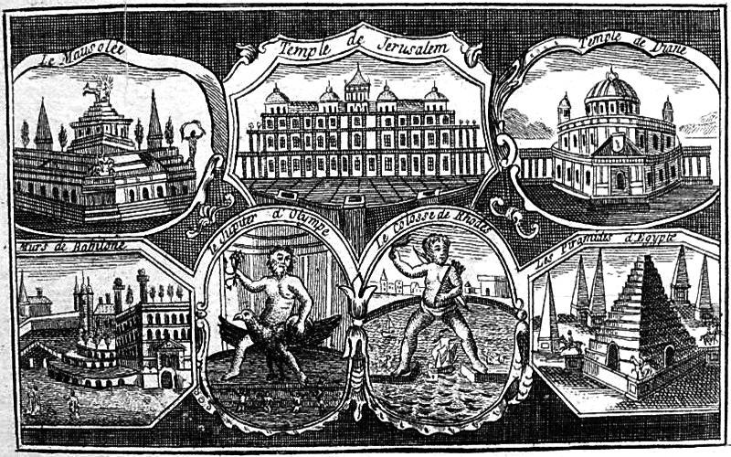 Les 7 Merveilles du Monde - Gravure du XVIIIème siècle